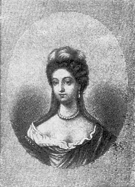 Maria Anna von Spiegel